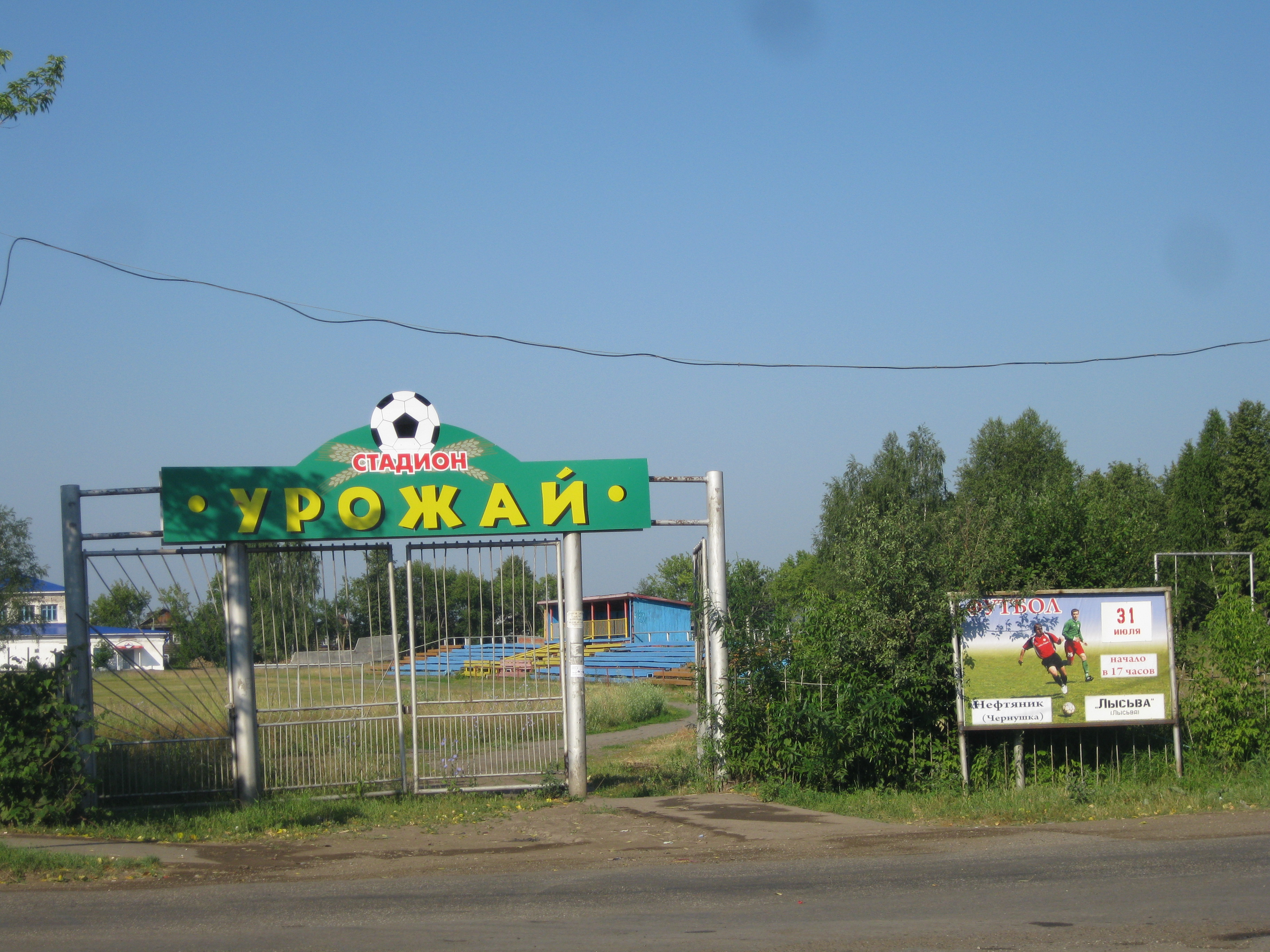 Стадион "Урожай" в городе Чернушка. (Основан в 1937 году).